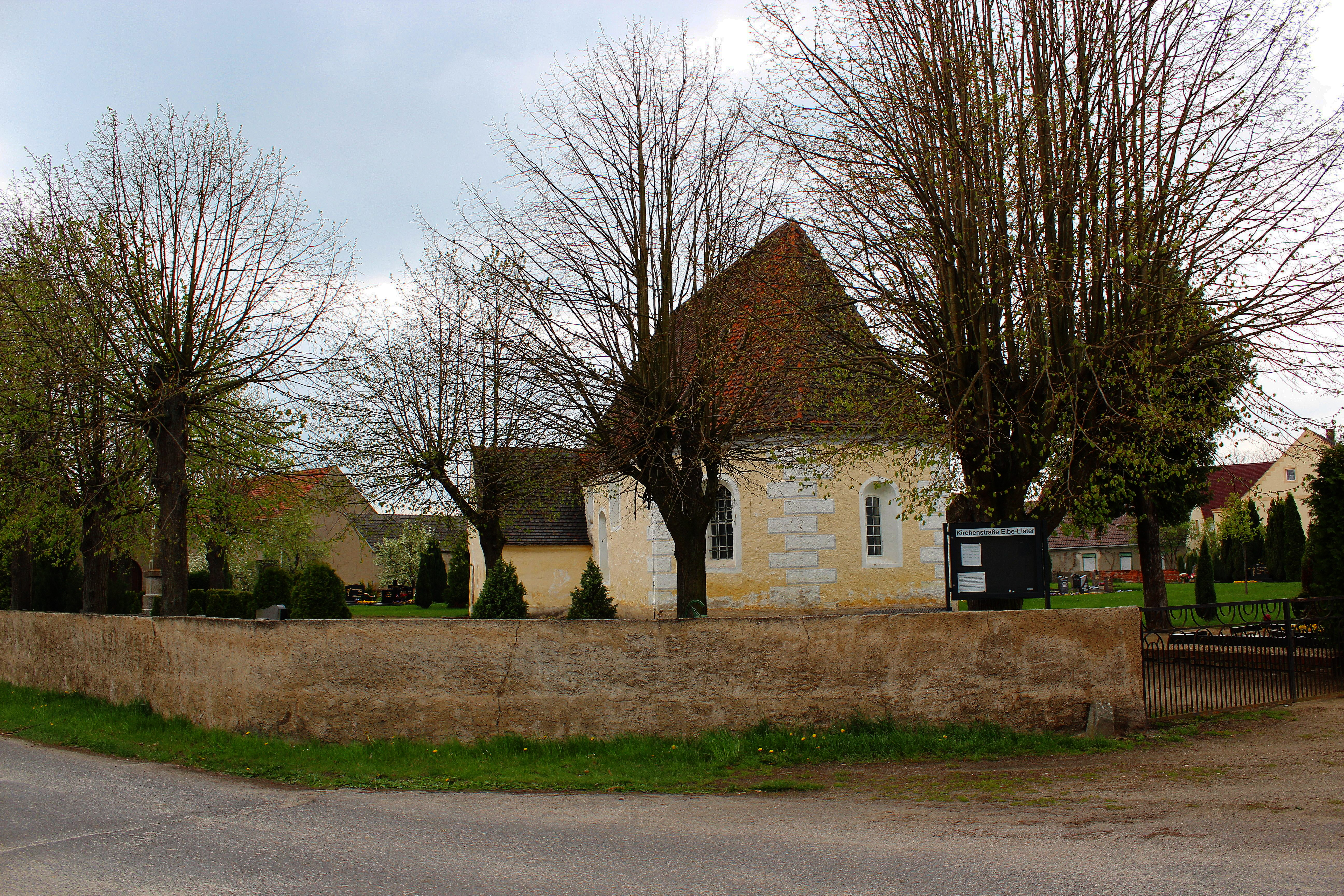 Bönitz.